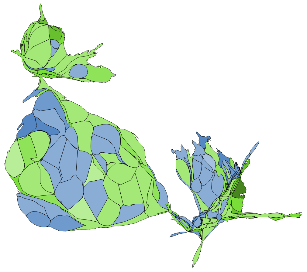 中文（台灣）: 顏色對照表